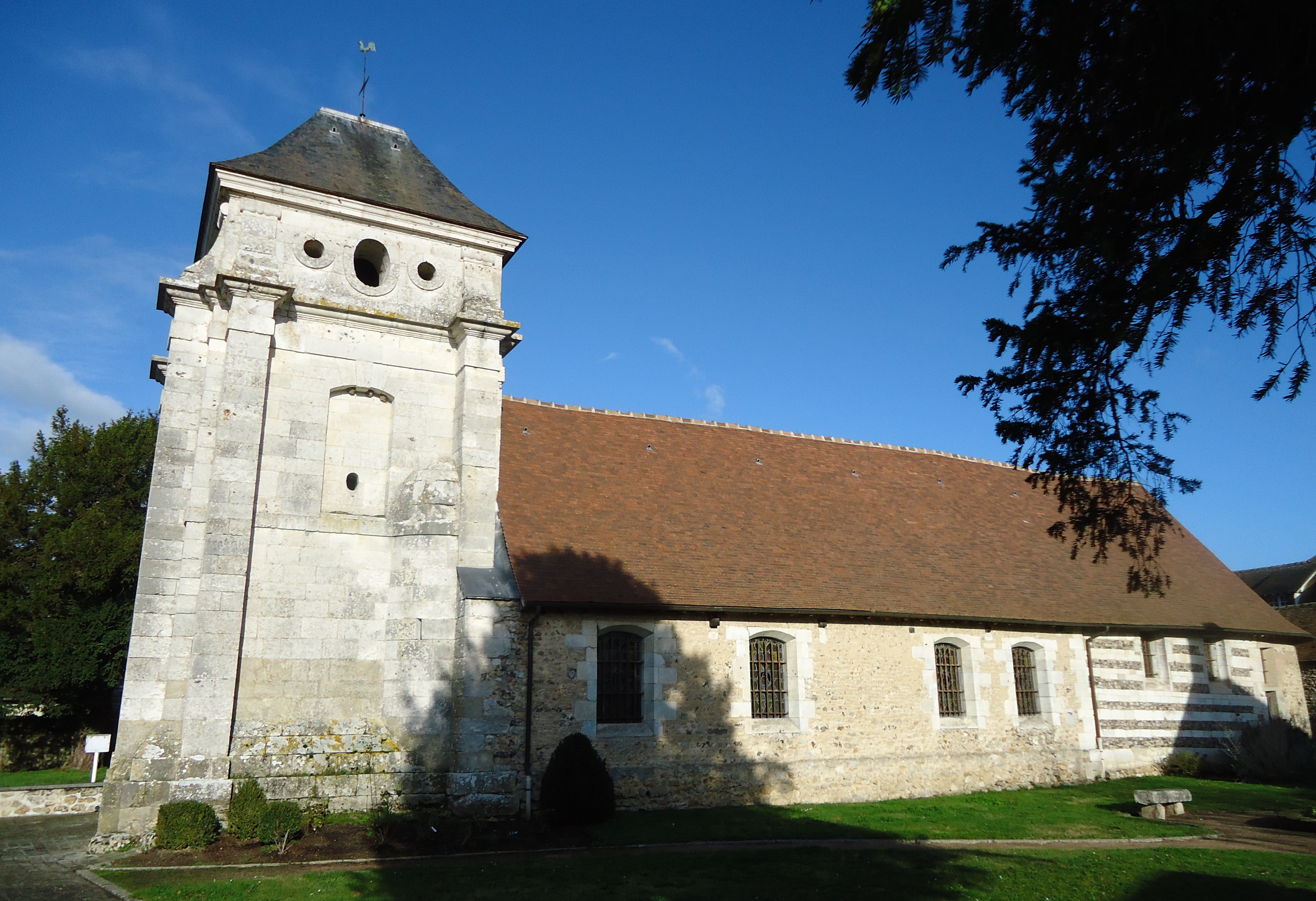 Autheuil-Authouillet - Eglise Saint-André XVe, XVIe & XVIIe (MH) - Ancienne commune d'Authouillet